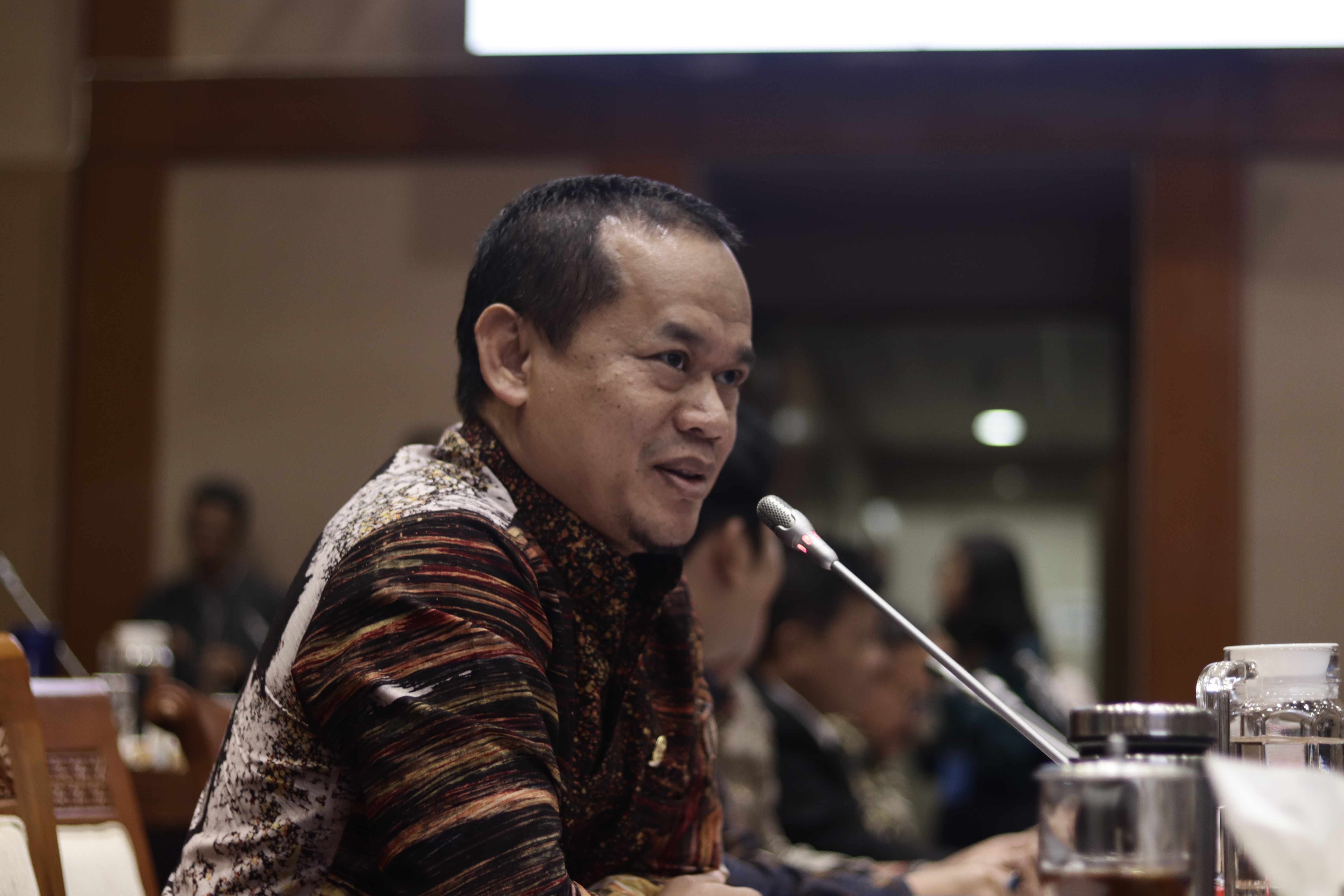 Rofik Hananto saat menyampaikan pandangan saat Rapat Kerja Komisi 7 DPR RI